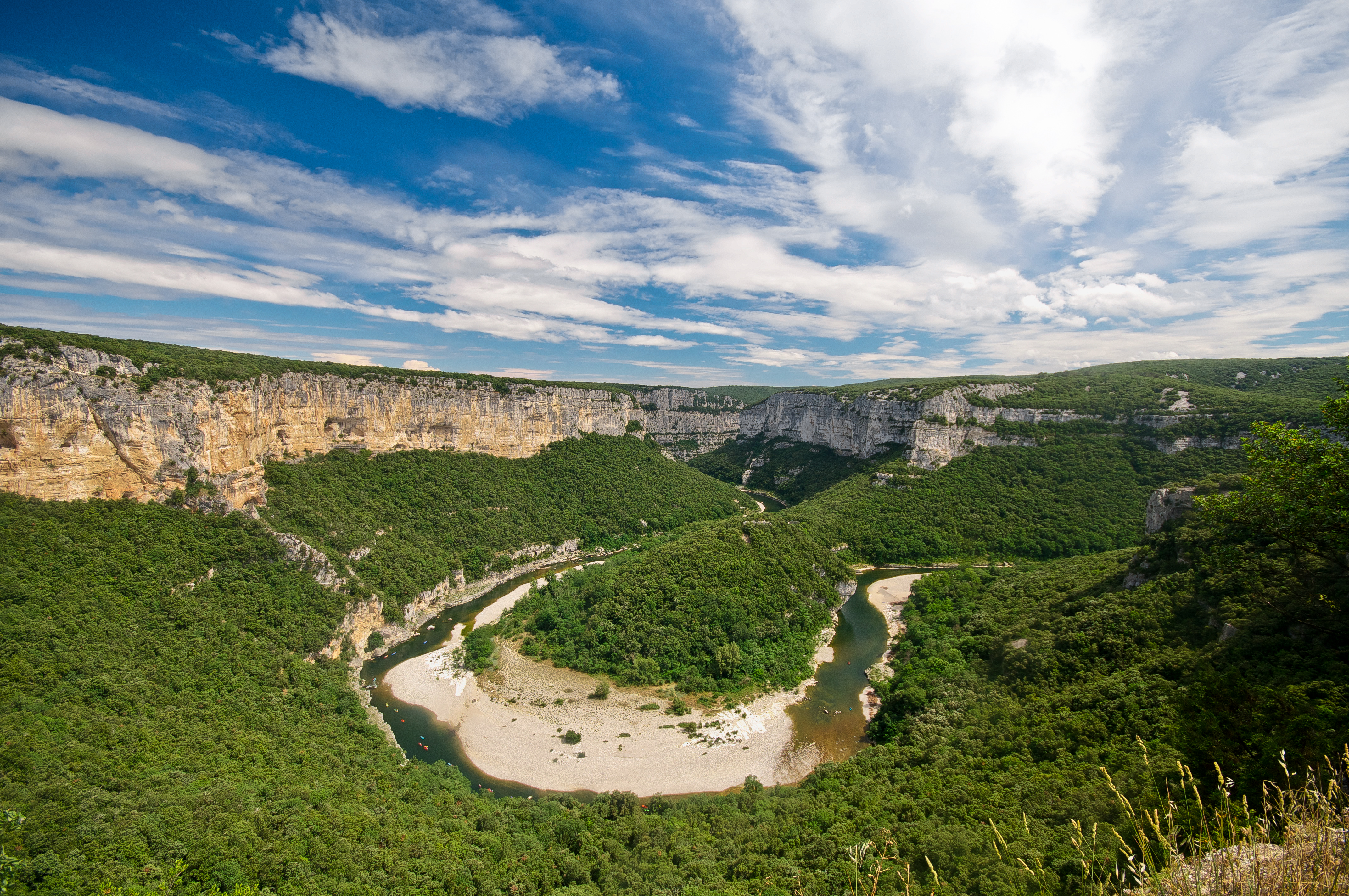 Cirque de la Madeleine, Gorges de l'Ardèche, Languedoc-Roussillon, Rhône-Alpes, France.